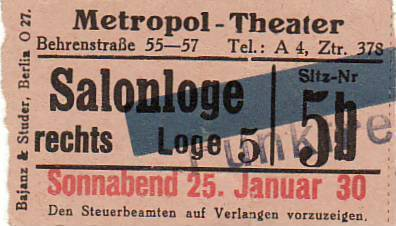 Eintrittskarte des Metropol-Theaters in der Behrenstraße in Berlin (das Gebäude dient heute als Sitz der Komischen Oper), 1930